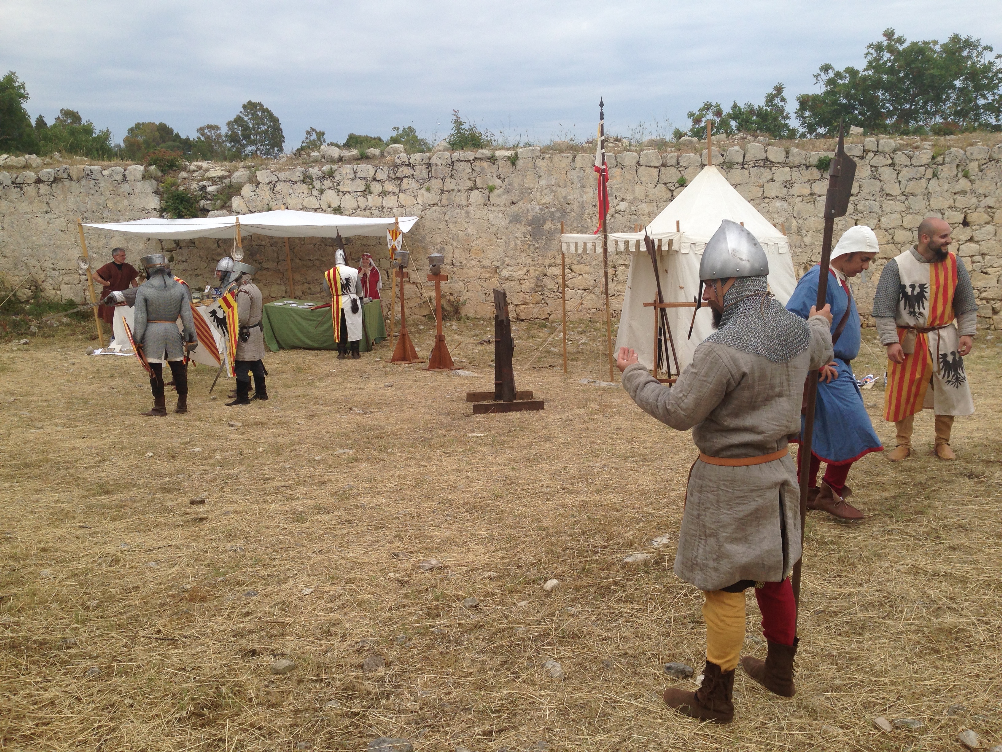 festival Alveria1